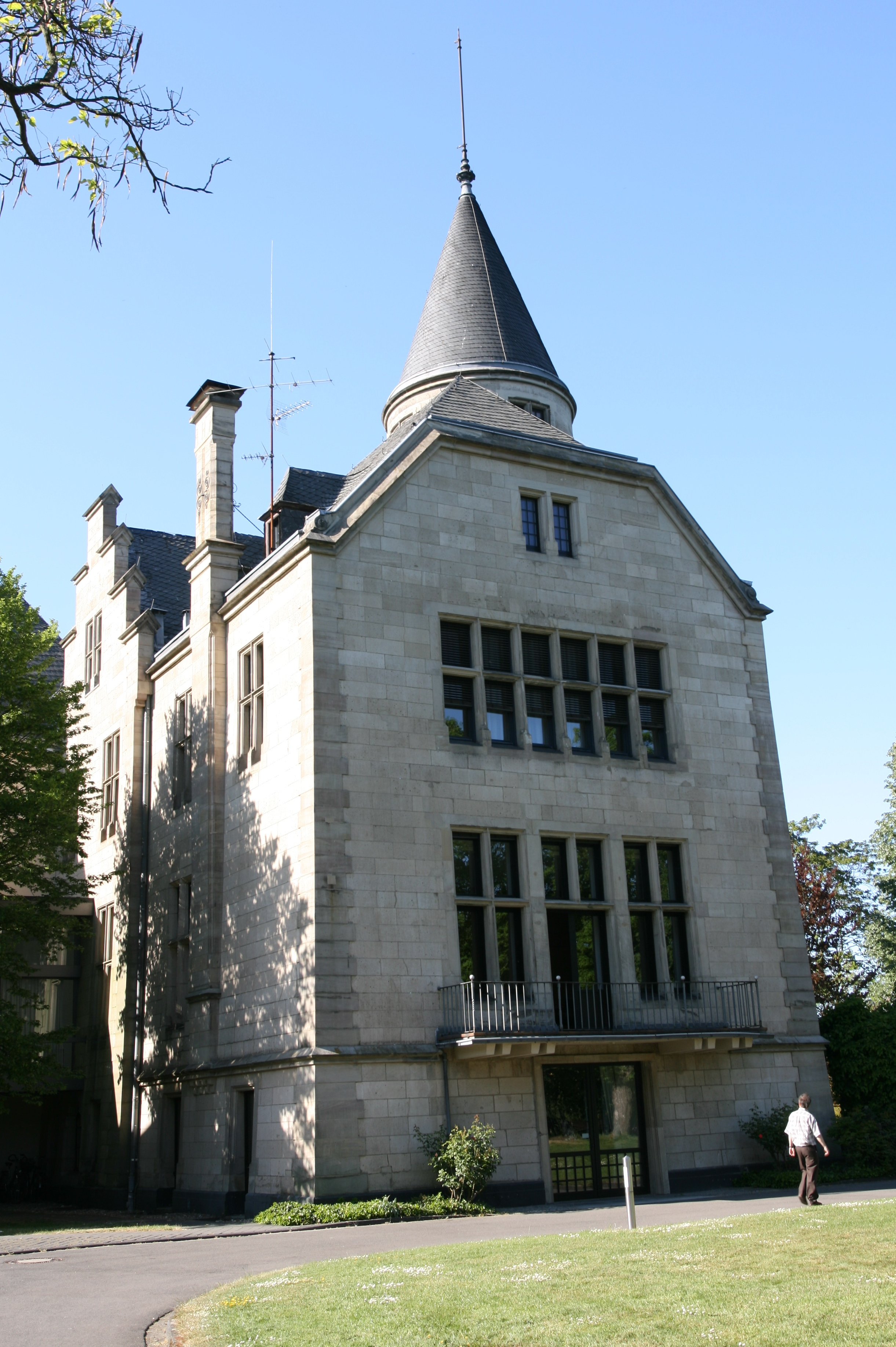 Haus Carstanjen in Bonn